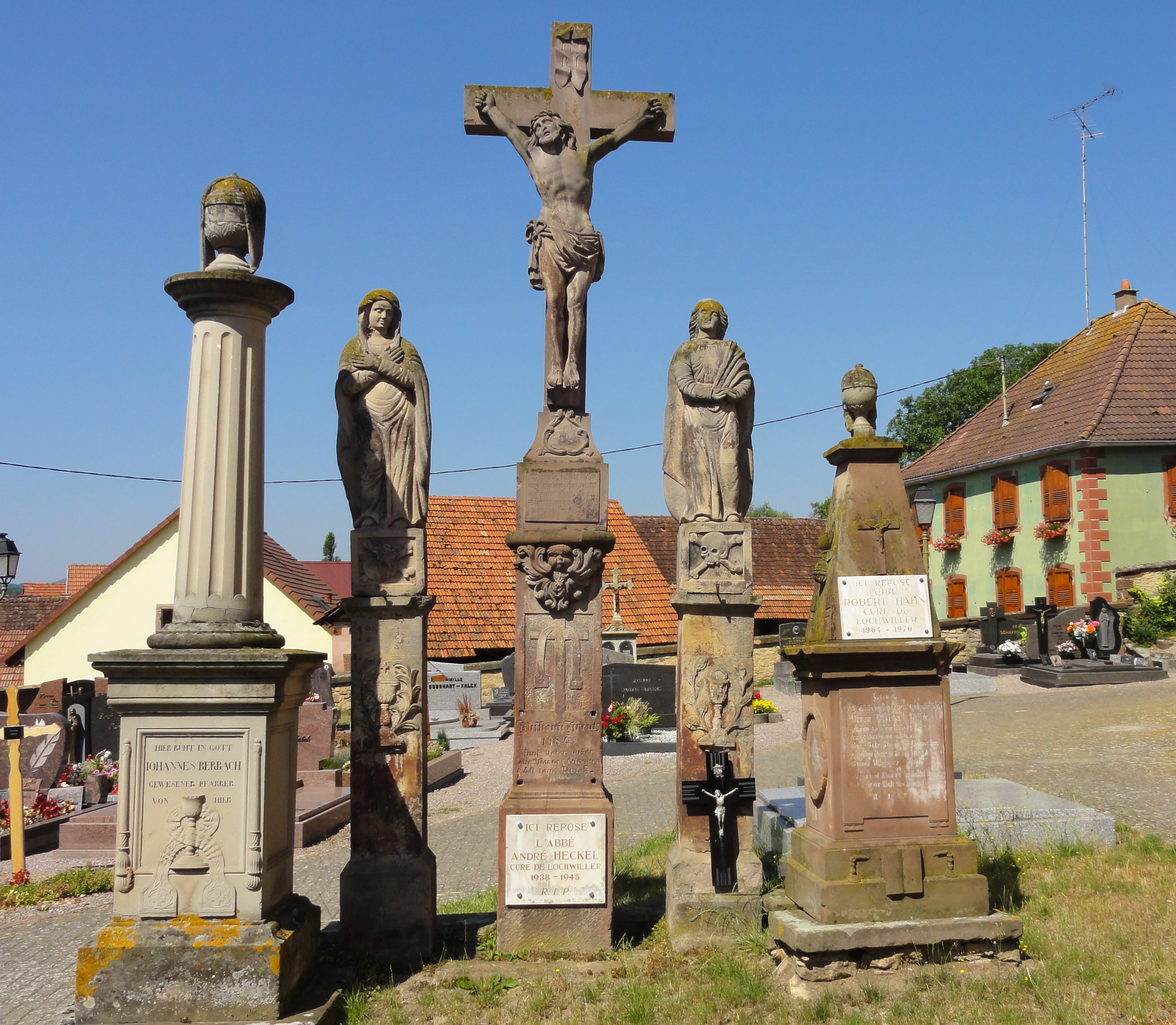 Alsace, Bas-Rhin, Cimetière, Calvaire (XIXe)